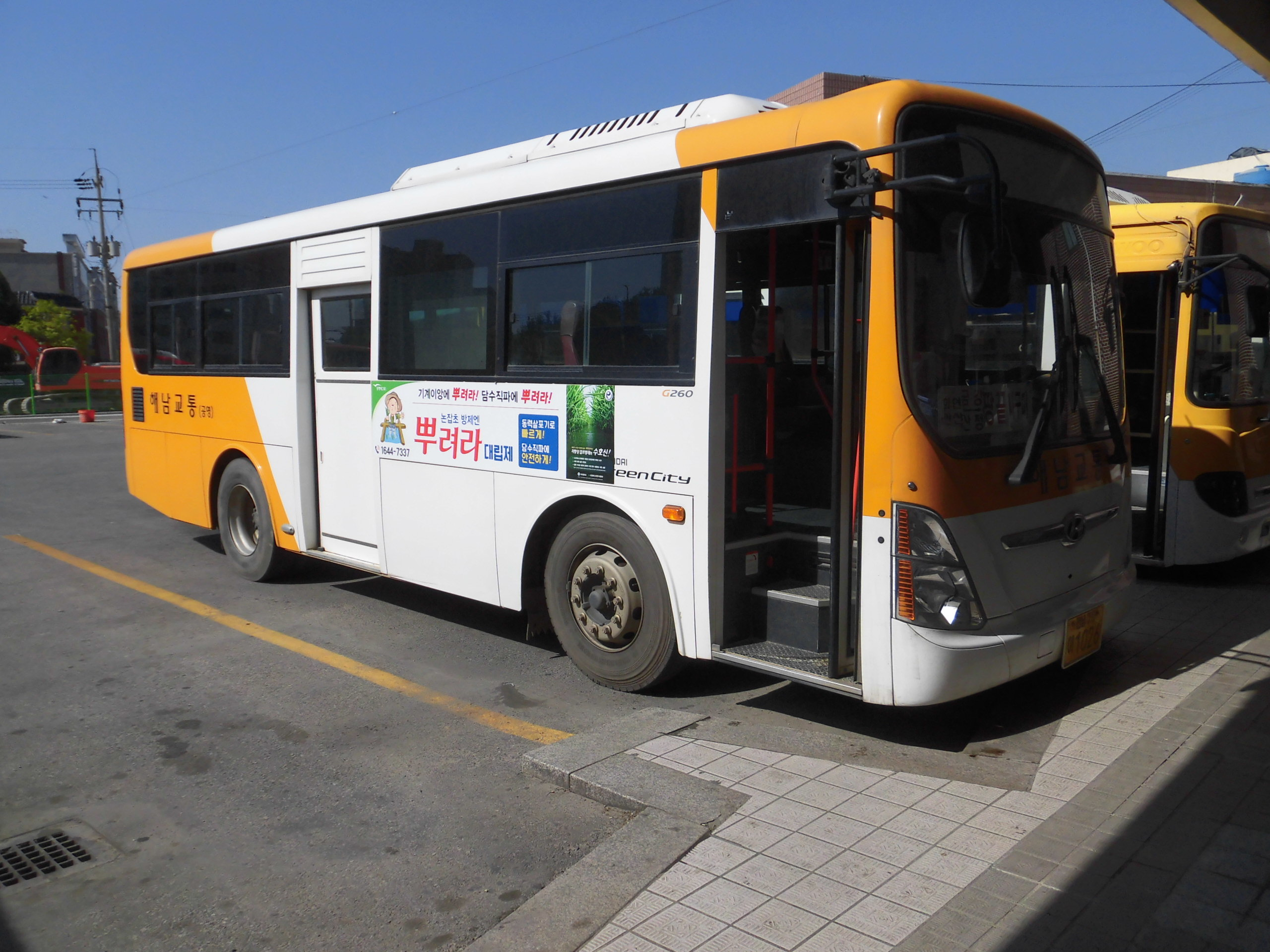 해남교통